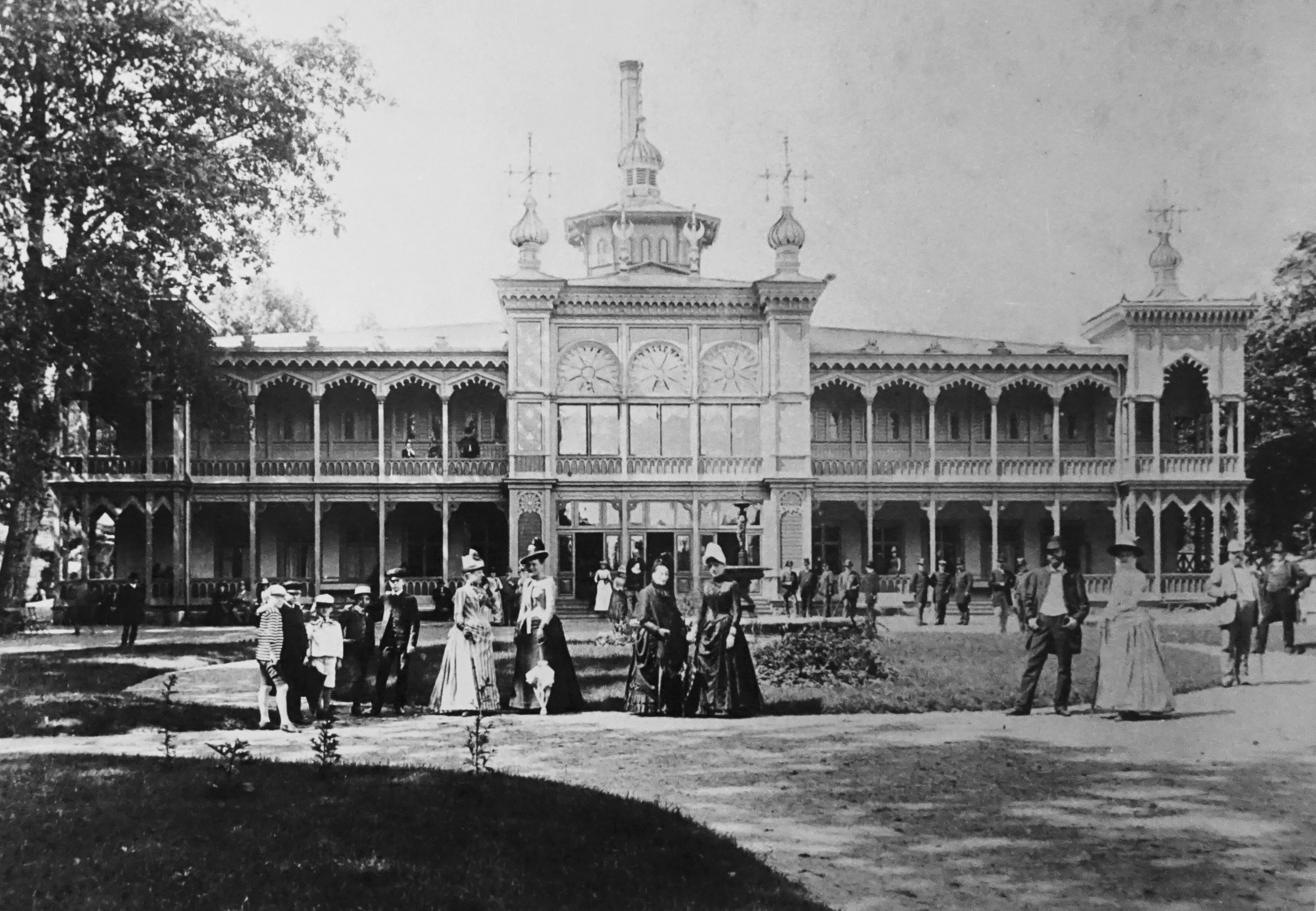 Badinrättning för kurorten Södertälje